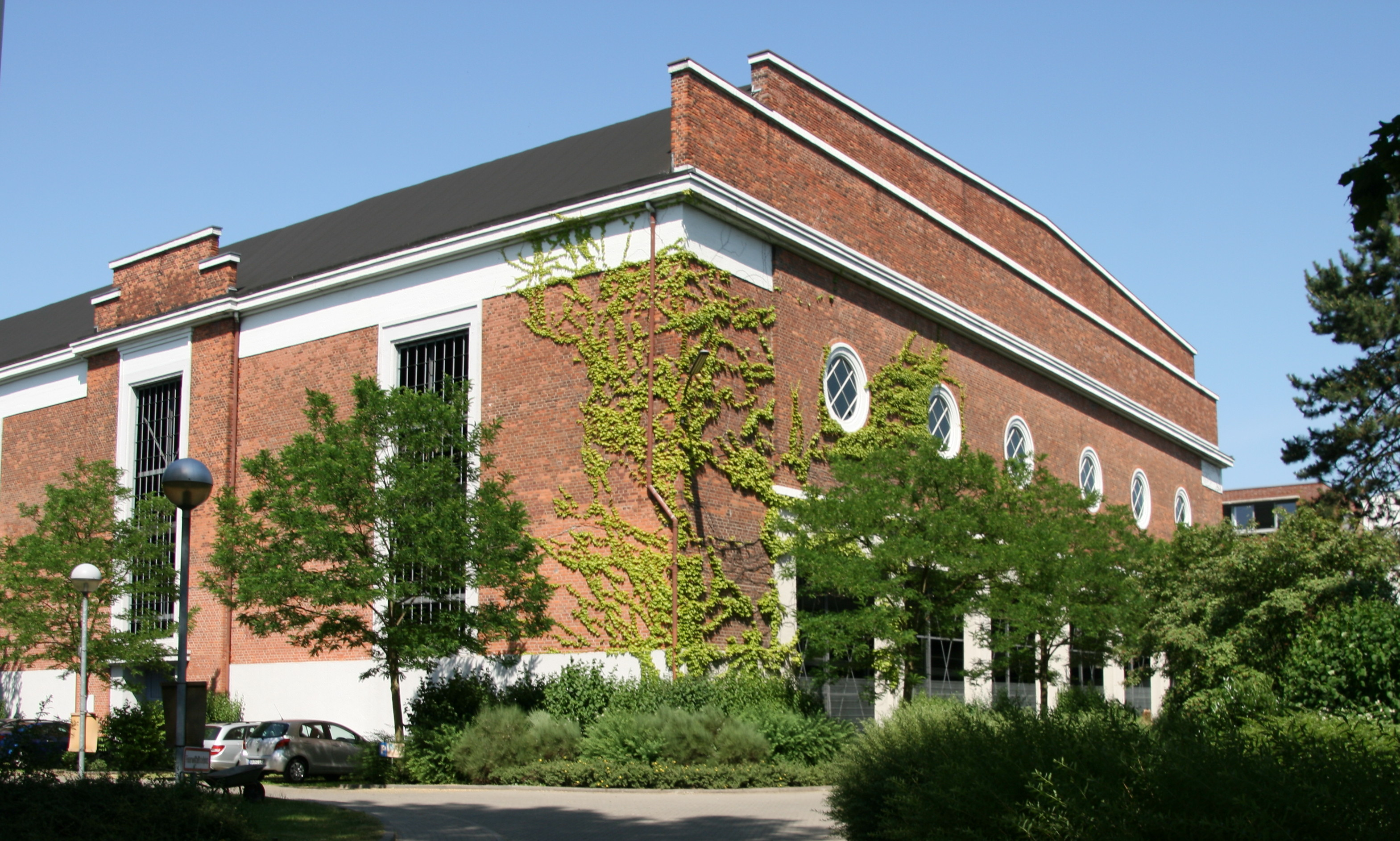 Eine von ehemals zwei Industriehallen der Firma Bahnbedarf Rodberg. Die Stahlkonstruktionen im Inneren entstammten zweier Zeppelinhallen aus Dywity (früher: Diwitten) bei Olsztyn (früher: Allenstein) im heutigen Polen, die 1921 dort demontiert und in Darmstadt wieder aufgebaut wurden. 1923 mit massiven expressionistisch gestalteten Ziegelwänden nach Jan Hubert Pinand versehen. 1977 brannte eine der Hallen ab, die zweite wird seit 1999 als Parkhaus genutzt. Darmstadt, Hessen